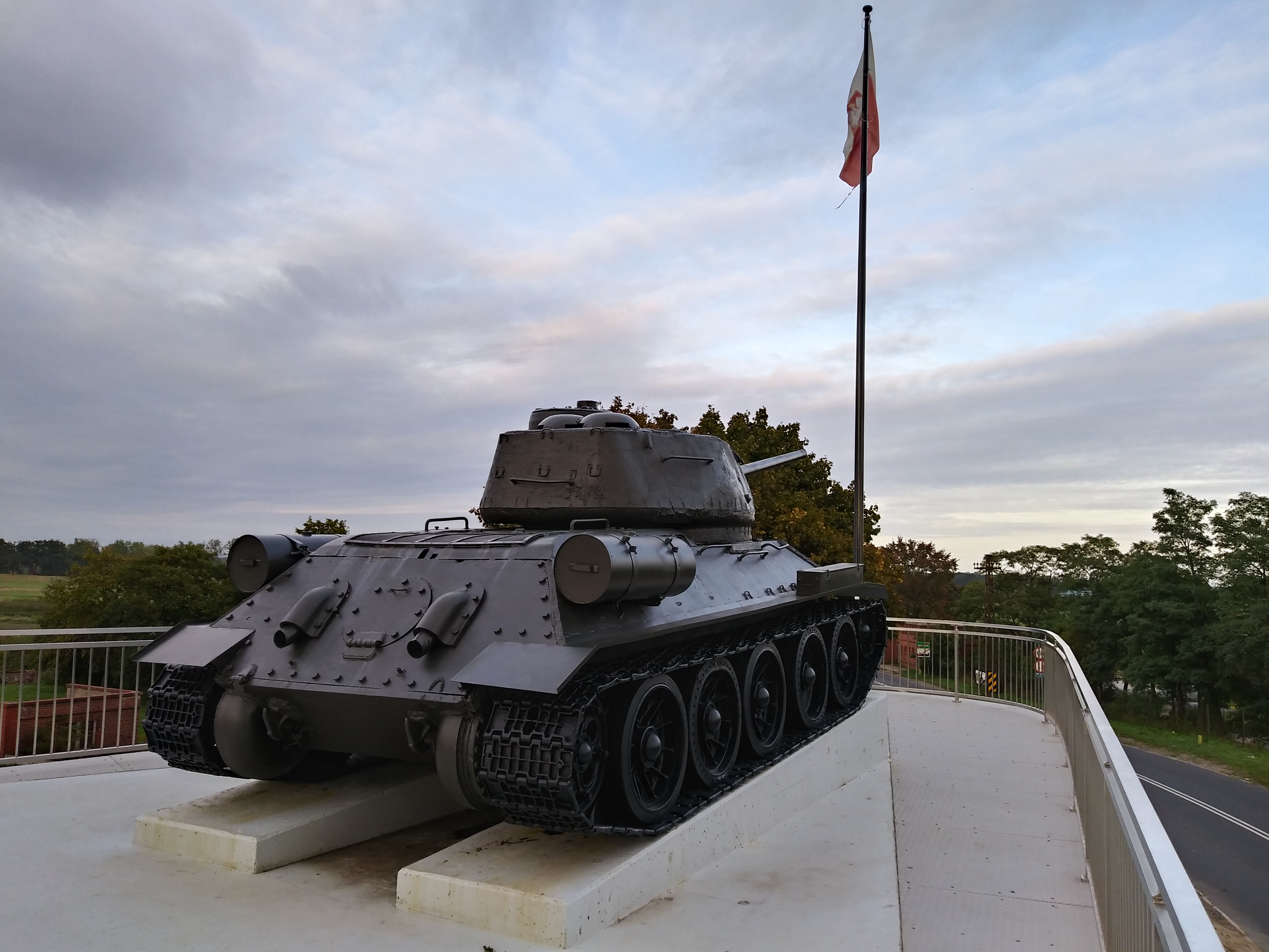 Odrestaurowany T-34-85 w Ścinawie nad Odrą, przeniesiony z wcześniejszej lokalizacji na Rynku